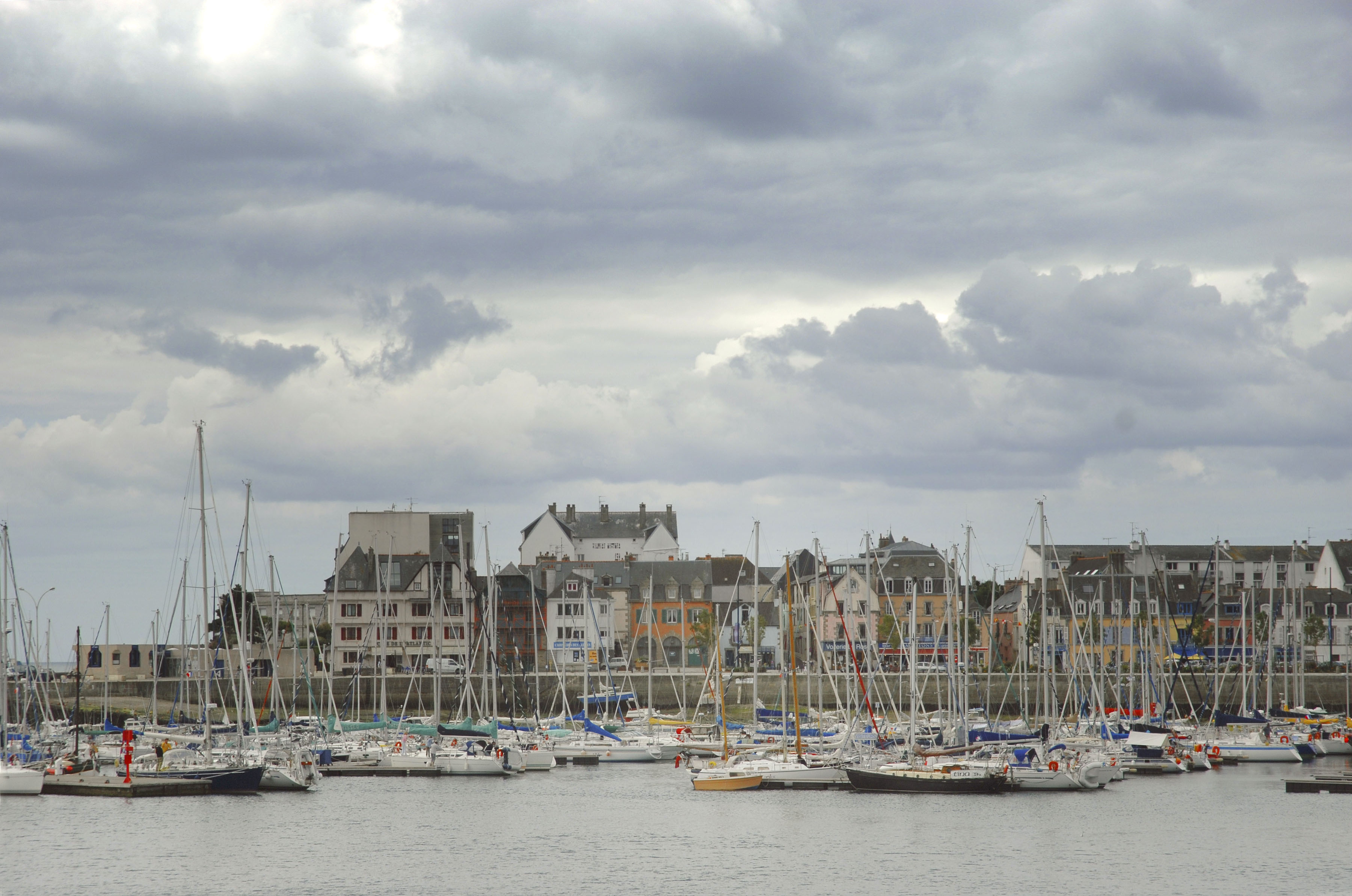 Concarneau.